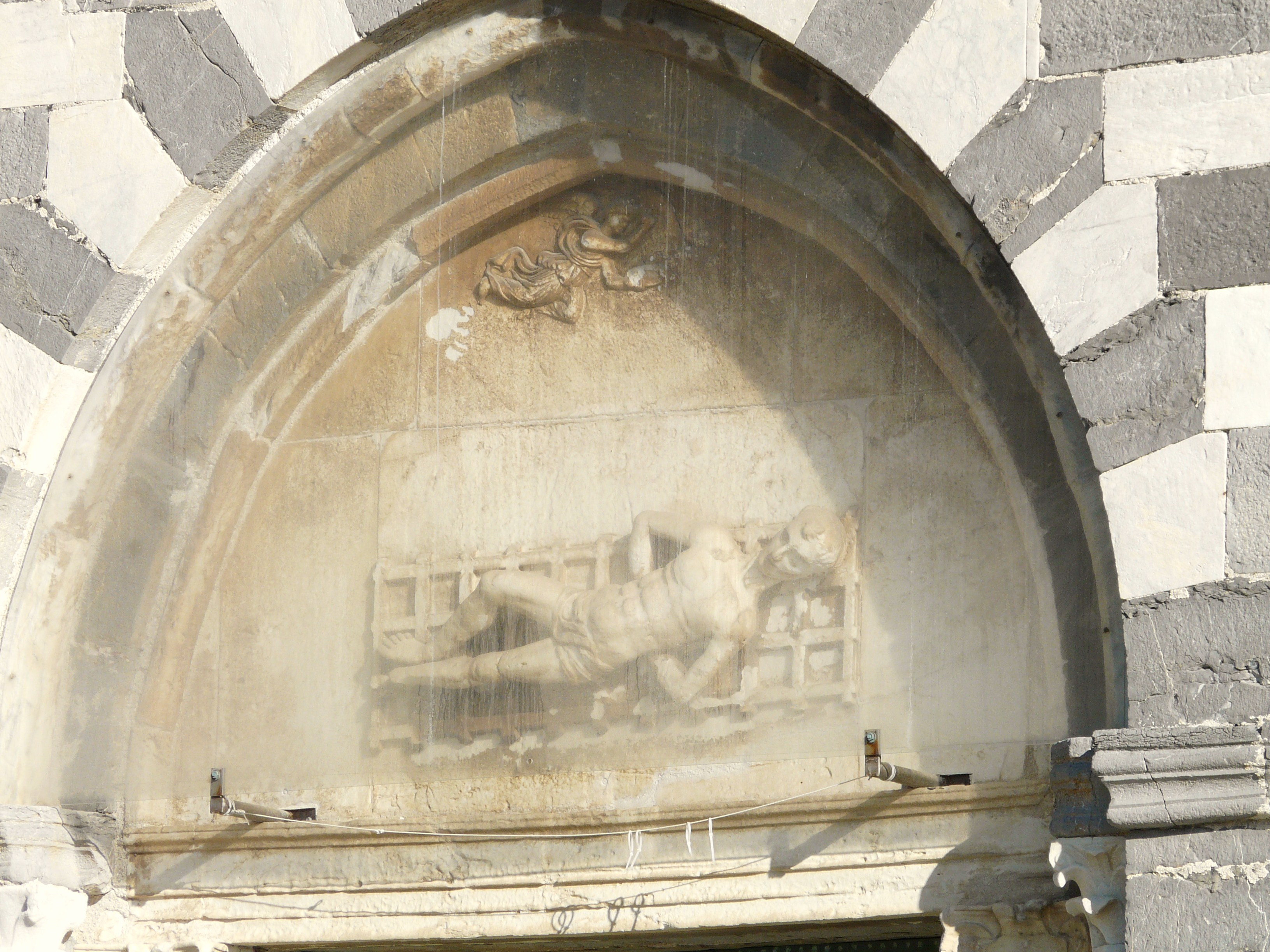 Chiesa di San Lorenzo, Porto Venere, Liguria, Italia